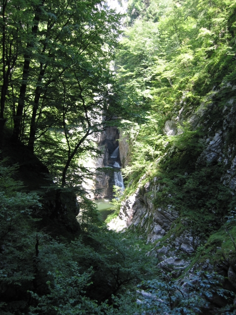 Höhlen von Škocjan - das Große Tal mit der Reka, bevor sie in den Höhlen verschwindet.